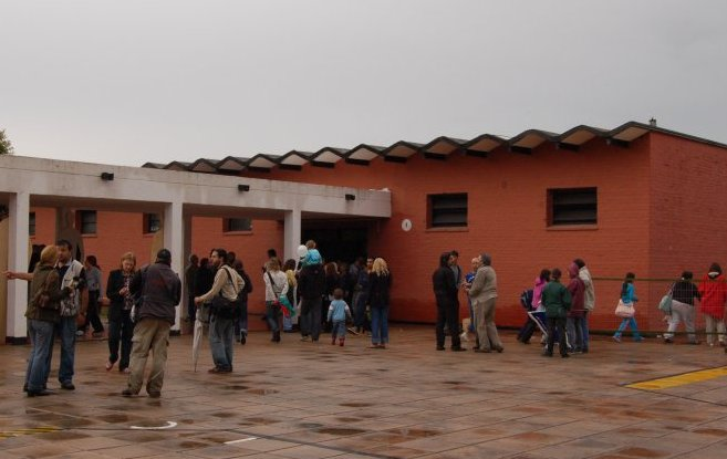 Acto de recuperación del terreno donde función el Centro Clandestino de Detención (CCD) de La Perla, Córdoba.